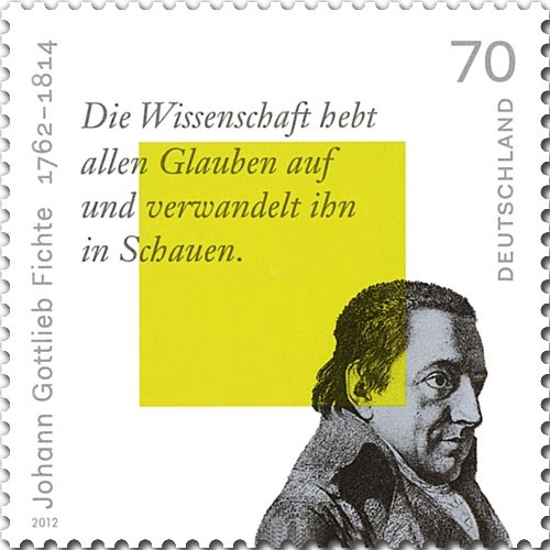 250. Geburtstag Johann Gottlieb Fichte